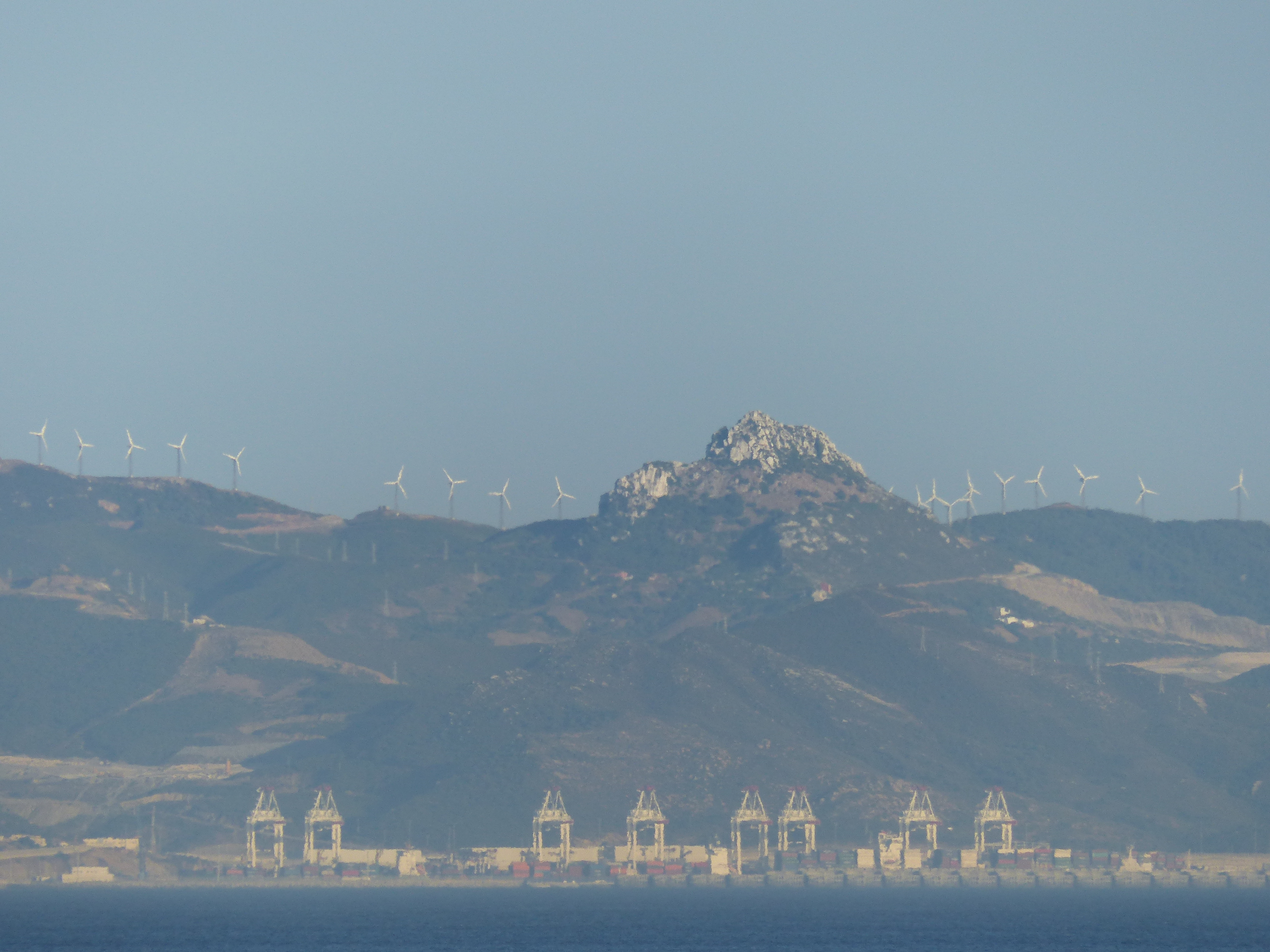 Tanger Med visto desde Tarifa, España, 2015